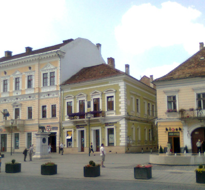 Bolyai János kolozsvári szülőháza